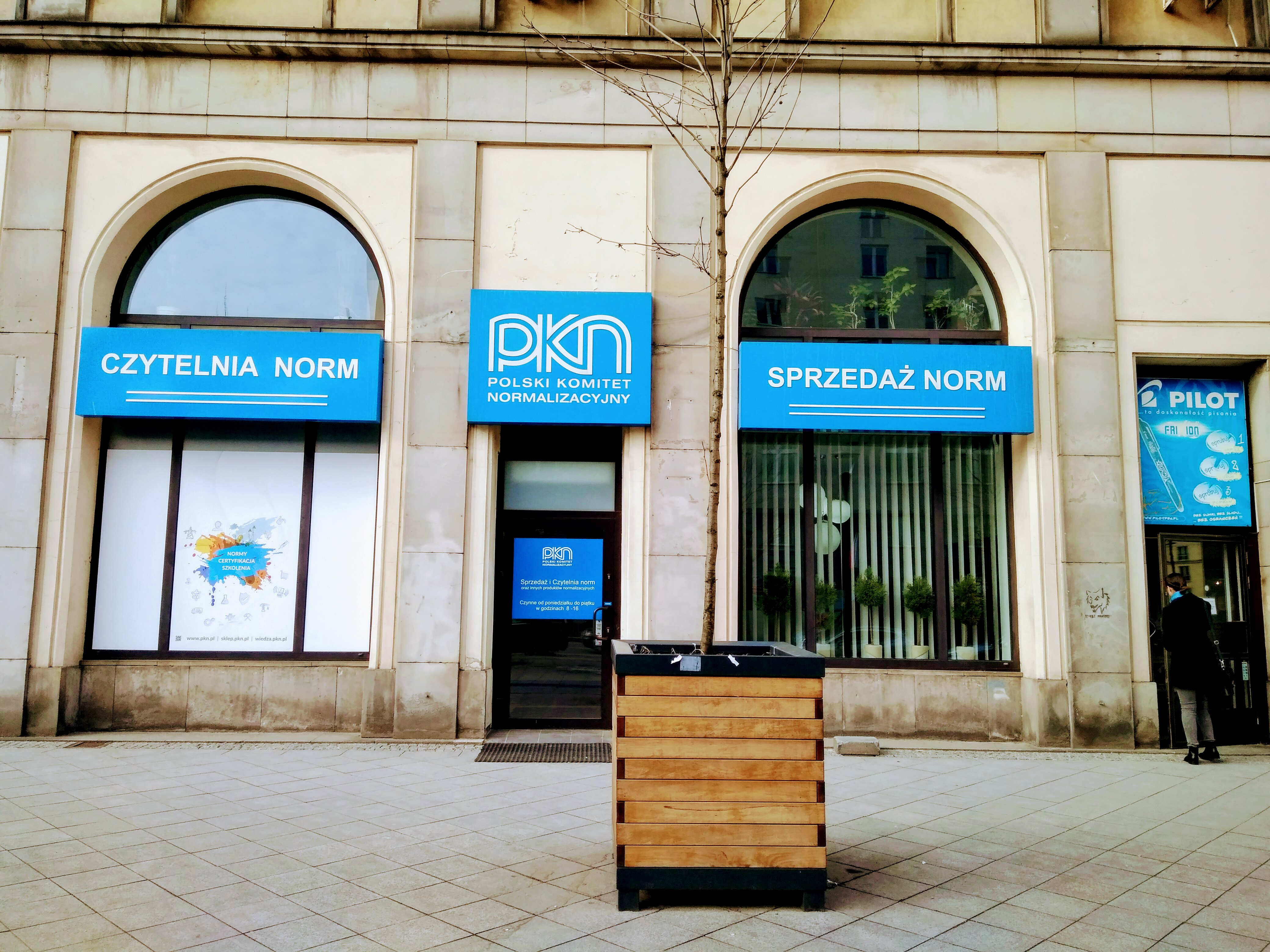 Polski Komitet Normalizacyjny - siedziba w Warszawie